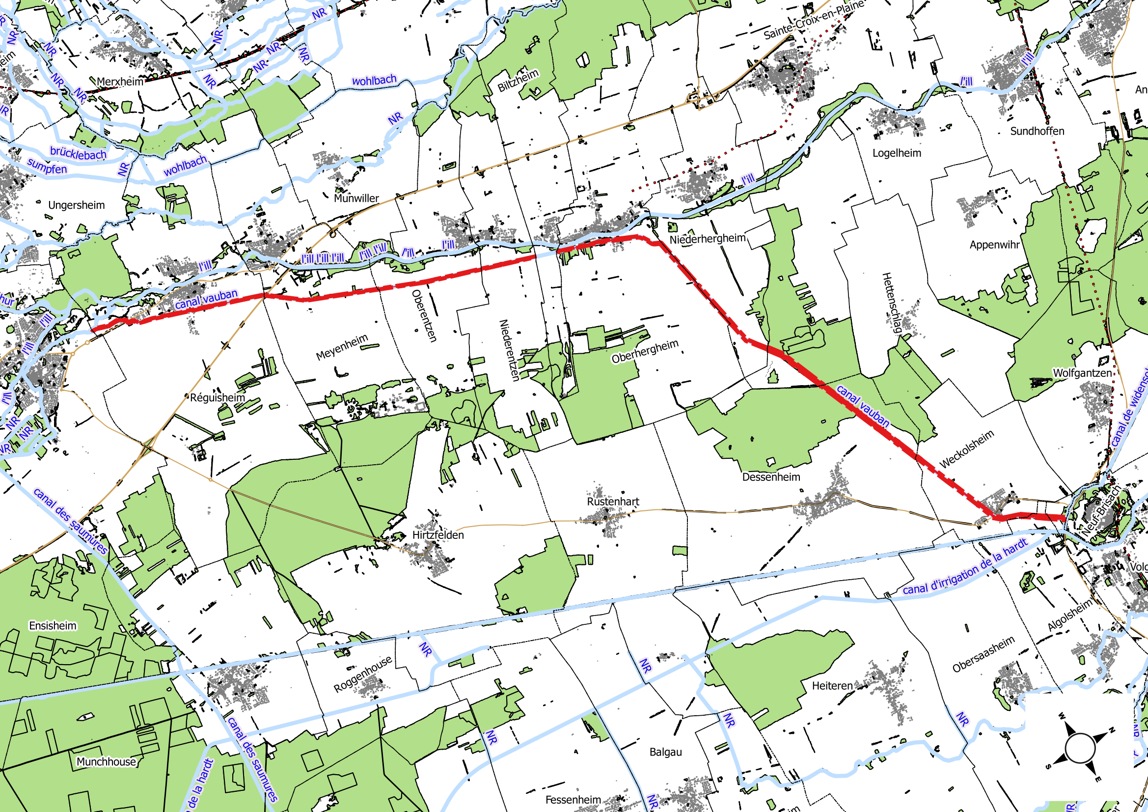 Tracé du canal dit "Vauban" , selon les emprises du cadastre, d'après la couche parcellaire du géoportail (transfert sous Qgis)